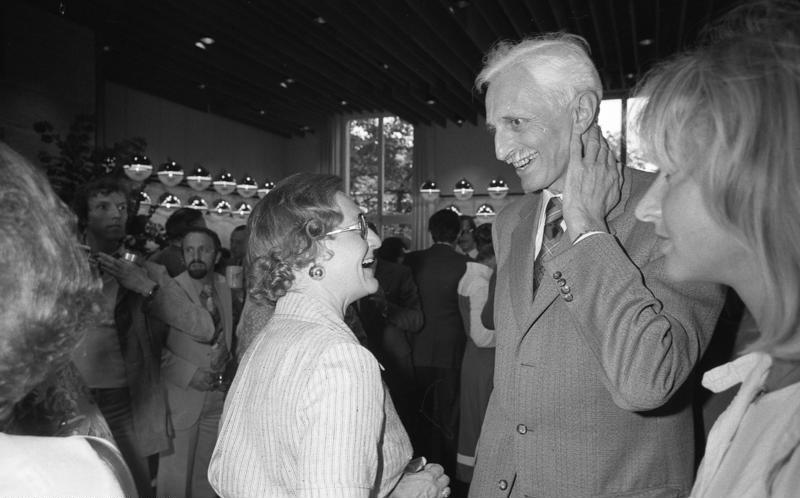 Eröffnung der Kunstausstellung "Bonner Köpfe" (Portraits von Maria Josepha v. Fürstenberg) in der Landesvertretung Baden-Württemberg. (rechts: Dr. Herbert Hupka)